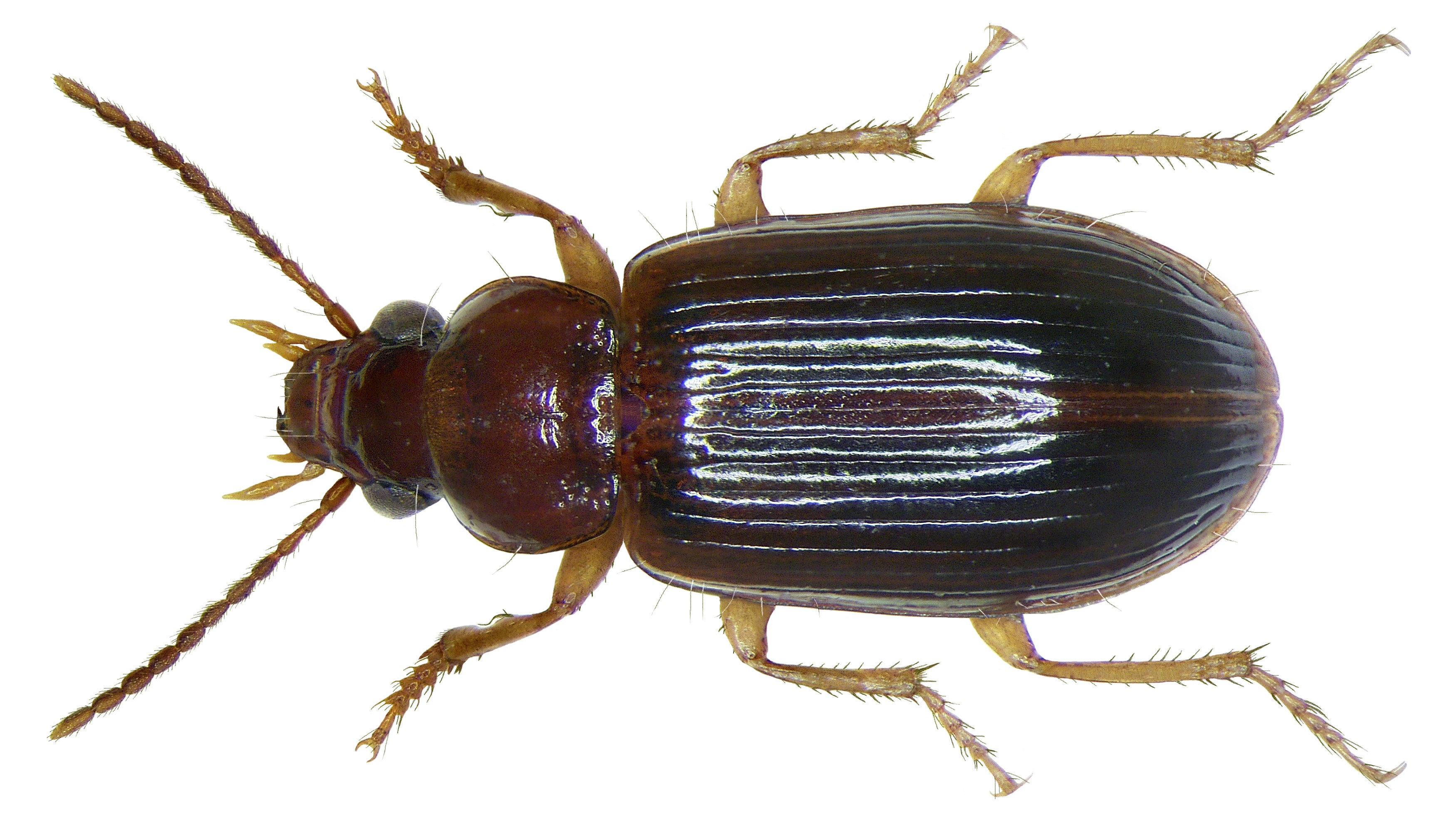 Familie: Carabidae Größe: 3,6-5,1 mm Verbreitung: von Madeira und Nordwestafrika über die Iberische Halbinsel, West- und Mitteleuropa bis Polen, bis Italien, Ungarn und der Balkanahlbinsel Ökologie: in der Bodenstreu von Heide- und Moorgebieten Fundort: Germania, Oberfranken, Marktredwitz leg.det. G.Rößler, 1992 Foto: U.Schmidt, 2008